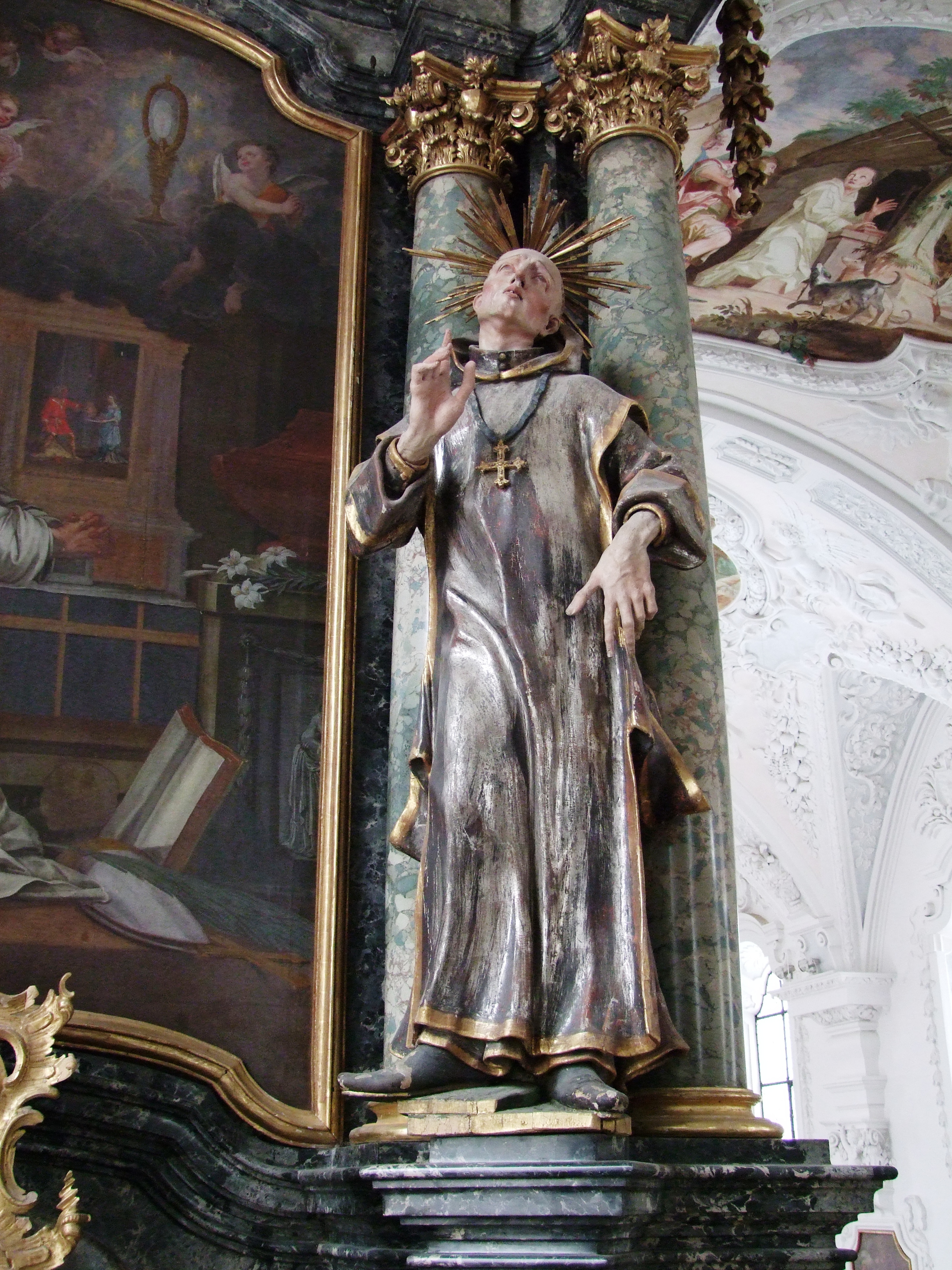 St. Maria im oberschwäbischen Buxheim bei Memmingen. Nördlicher Lettneraltar, Hugo von Grenoble